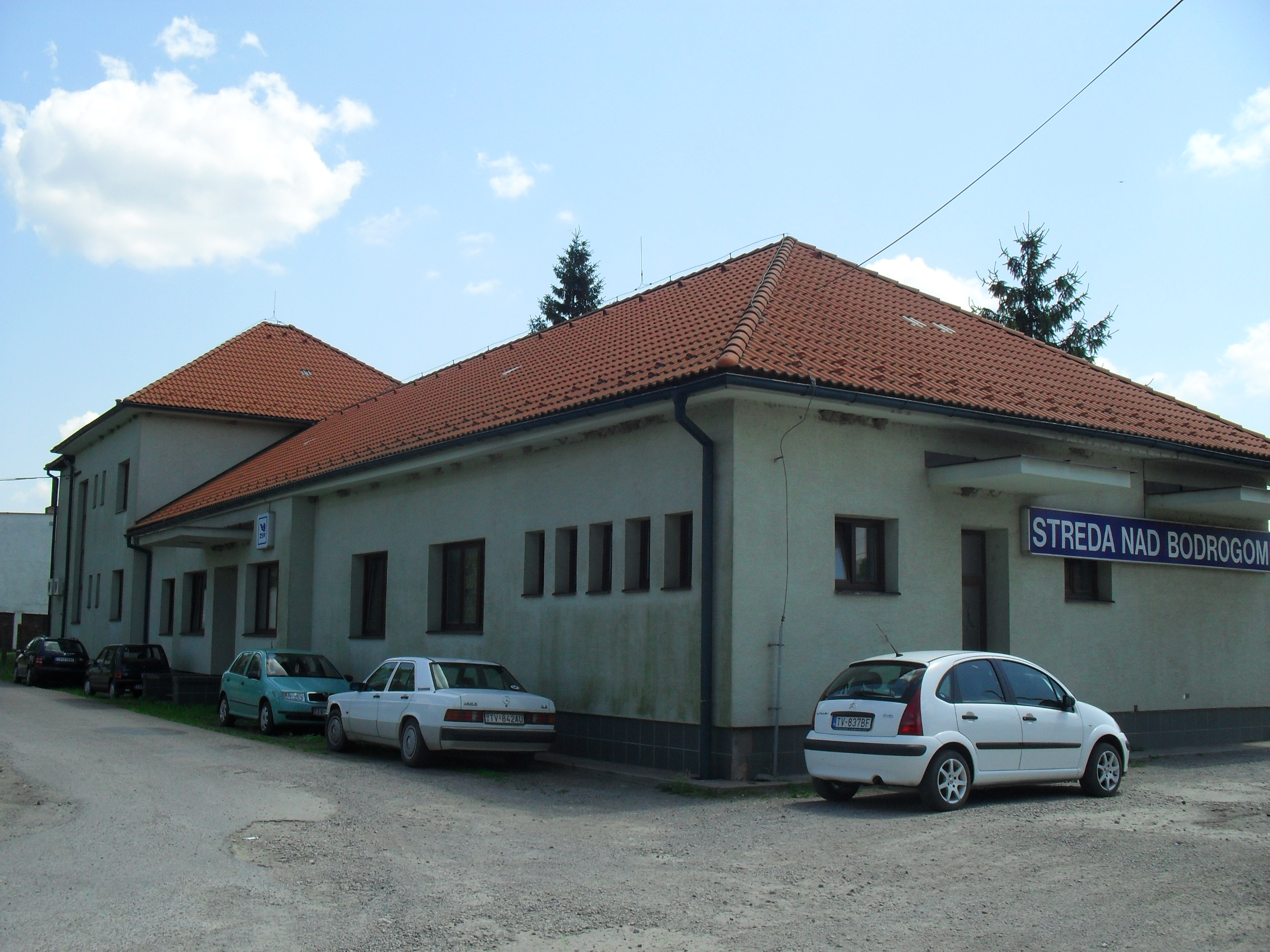 Bodrogszerdahely - vasútállomás